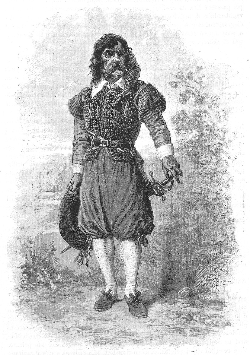 Il bravo